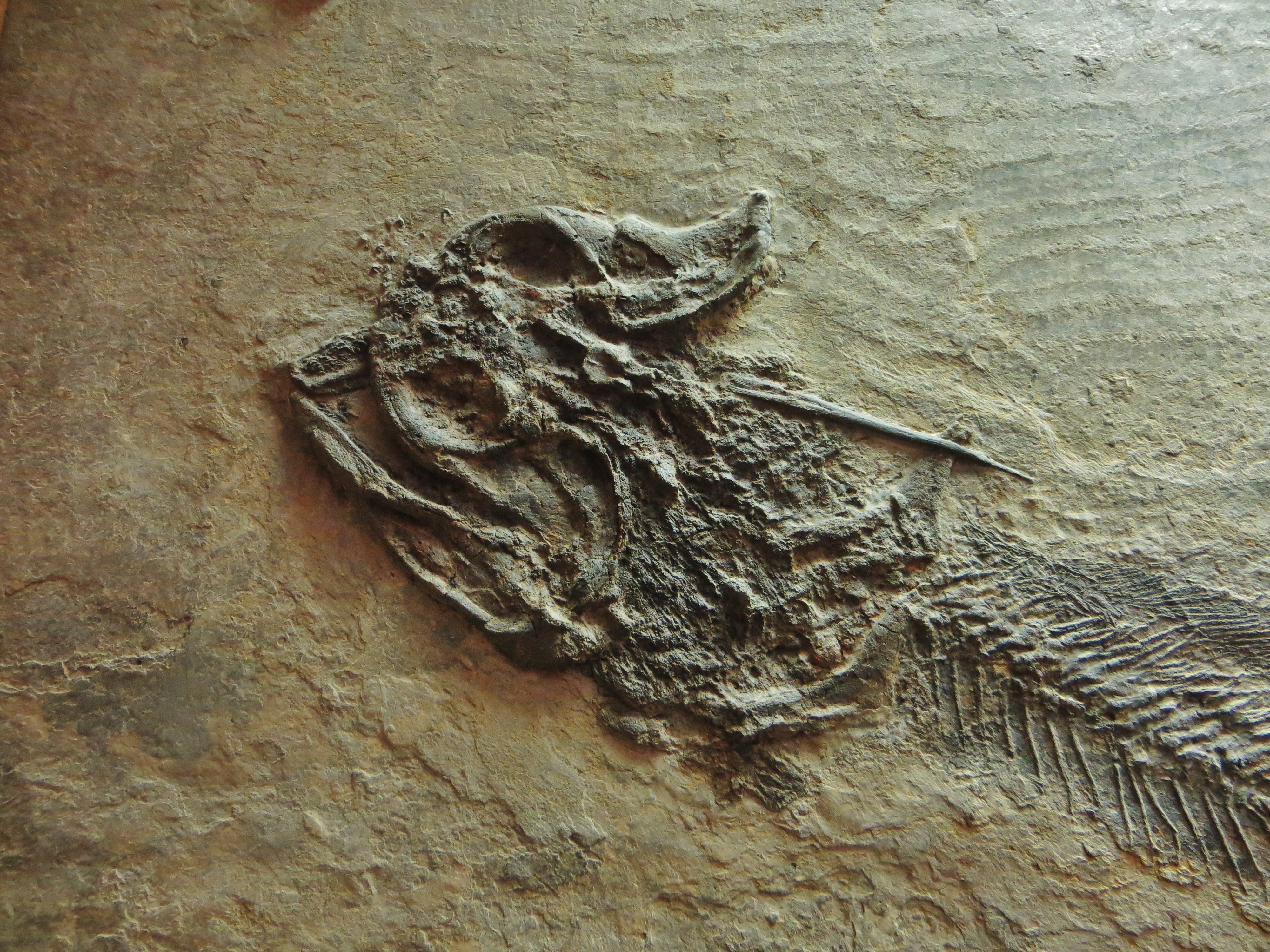 Fossil of Triodus- Took the picture at Natural History Museum, Mainz